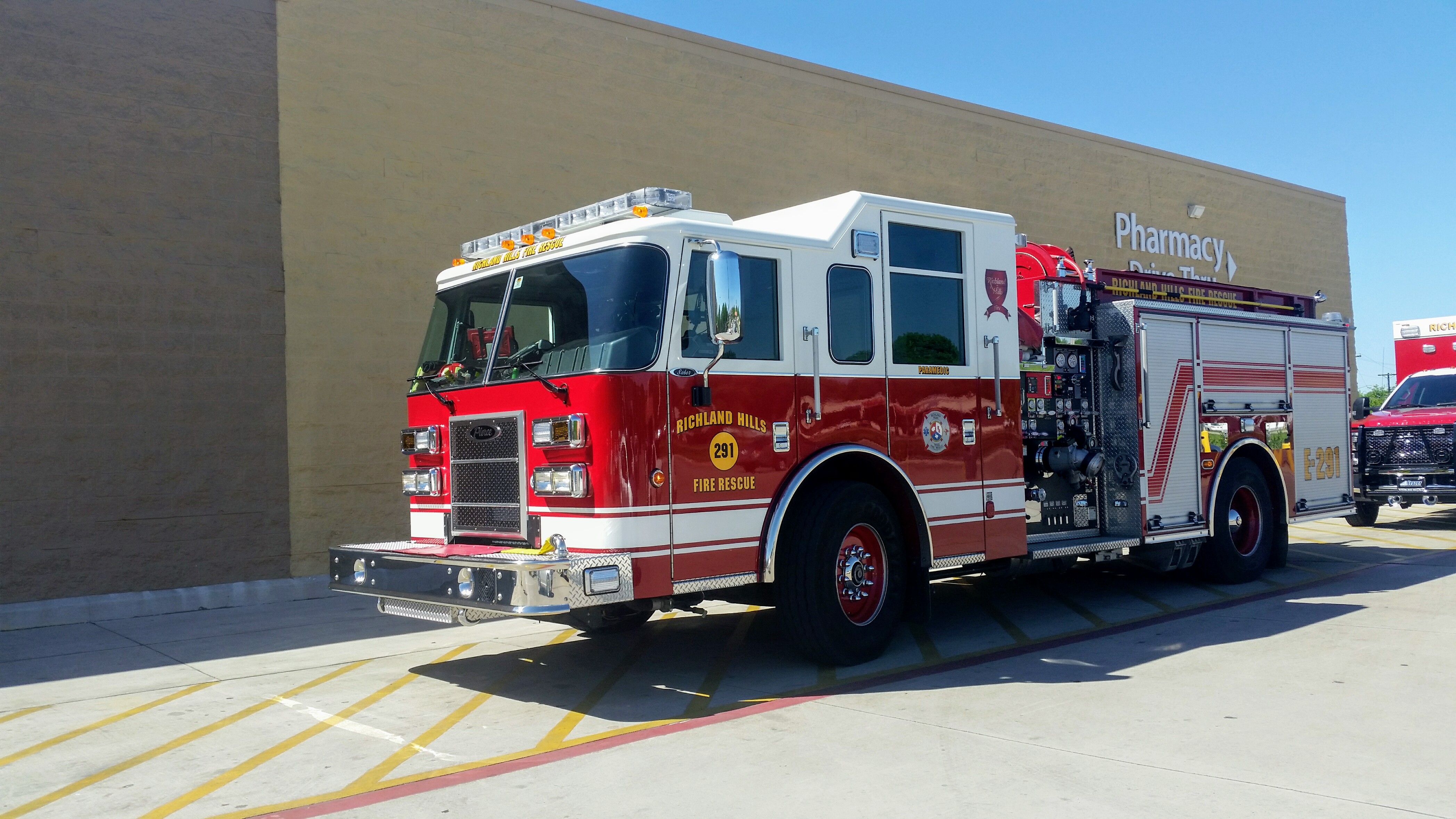 Richland Hills Fire Rescue Engine 291